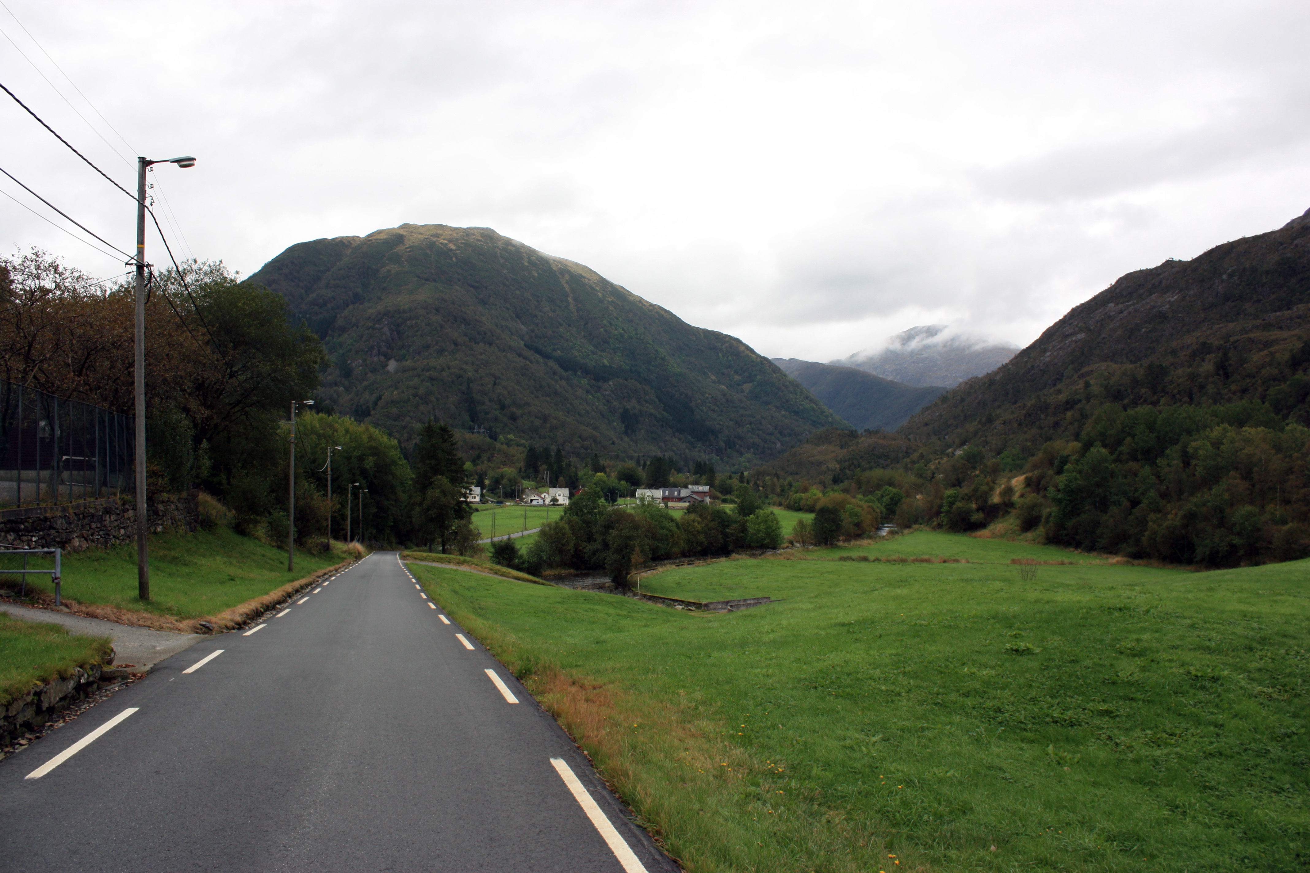 Hausdalsvegen, Fana, Bergen.